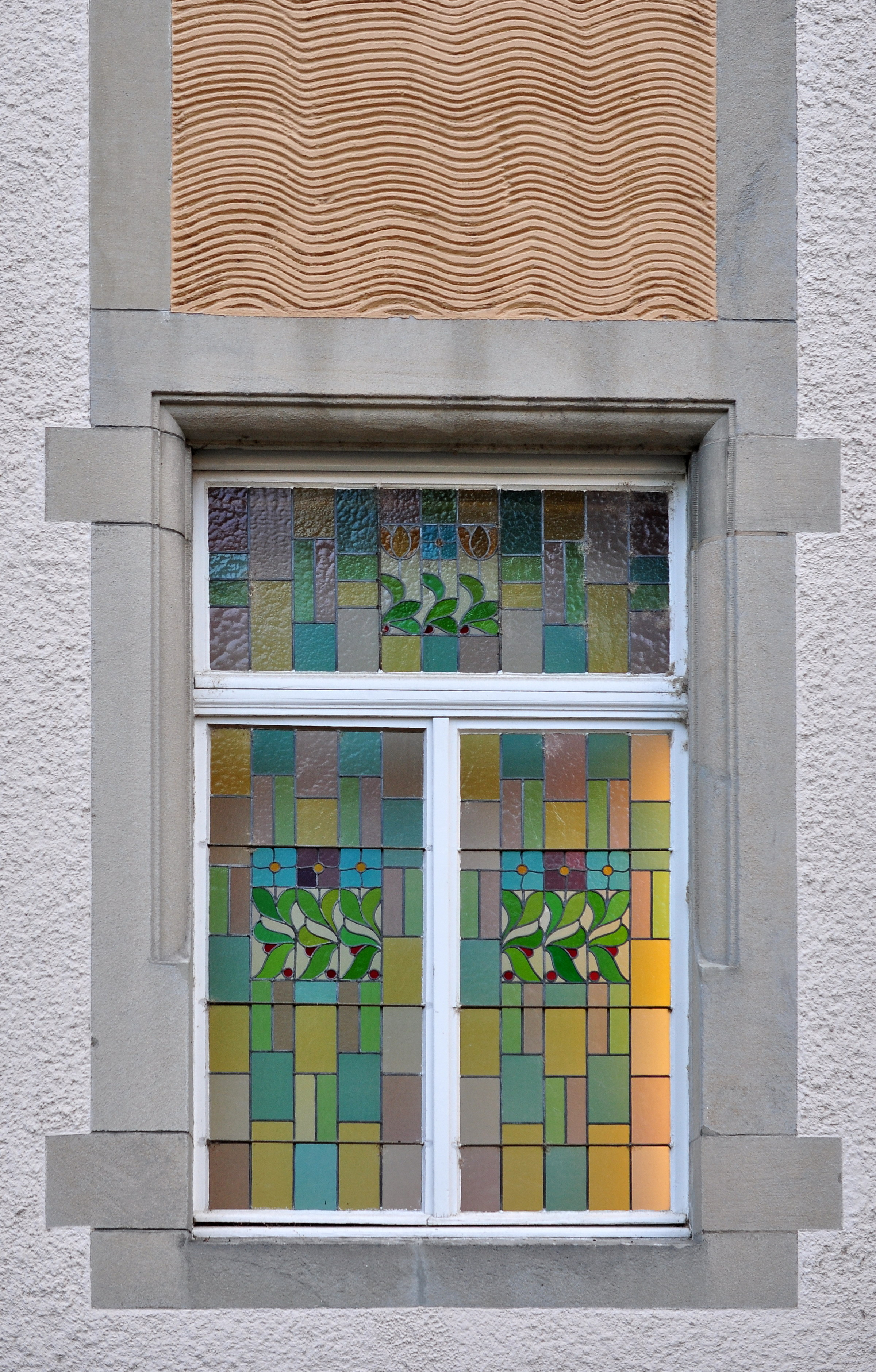 ‹Blinde Kuh›, Mühlebachstrasse in Zürich-Mühlebach (Switzerland)